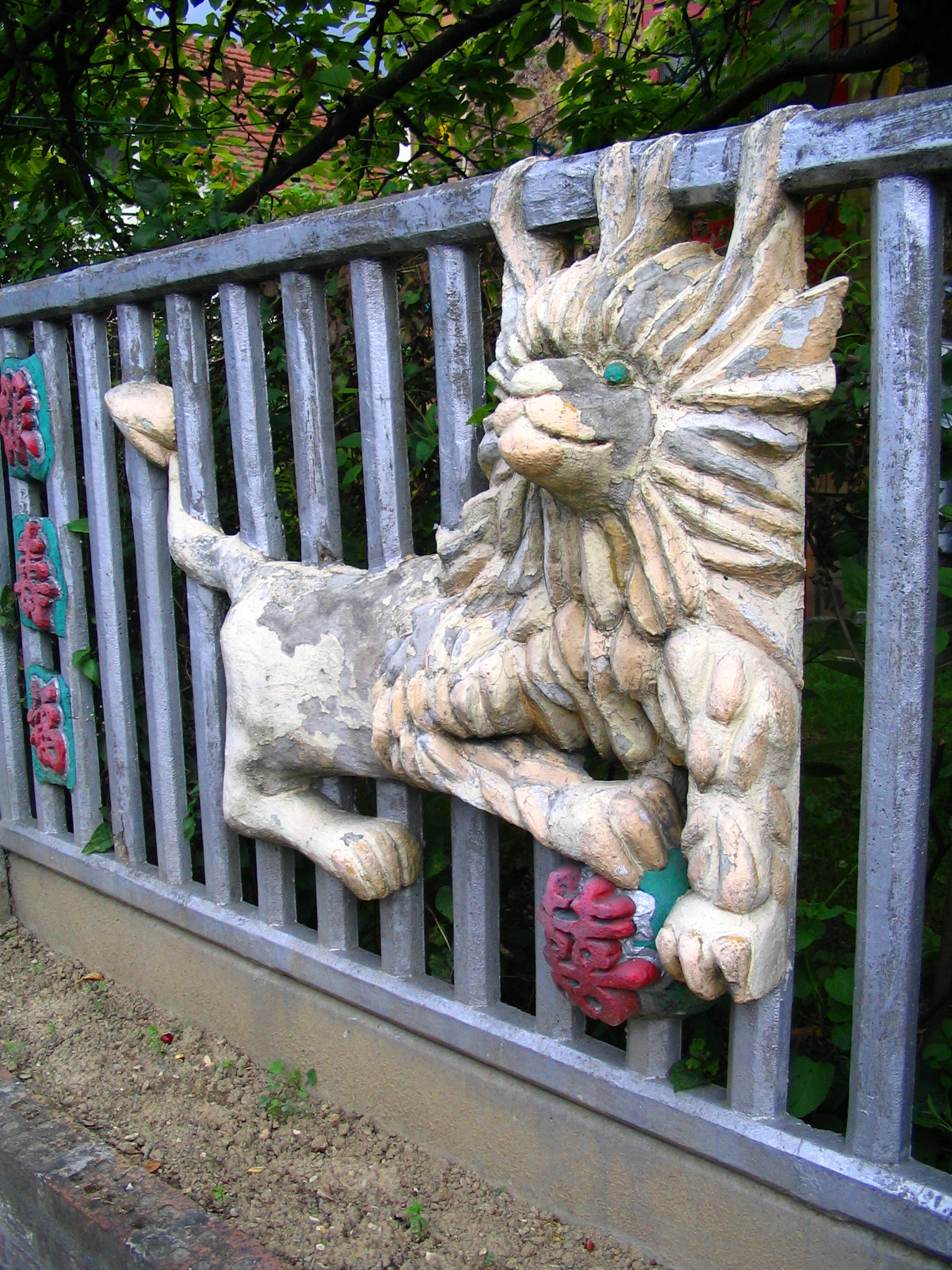 Maison chinoise à Ablon-sur-Seine (Val-de-Marne, Île-de-France, France).